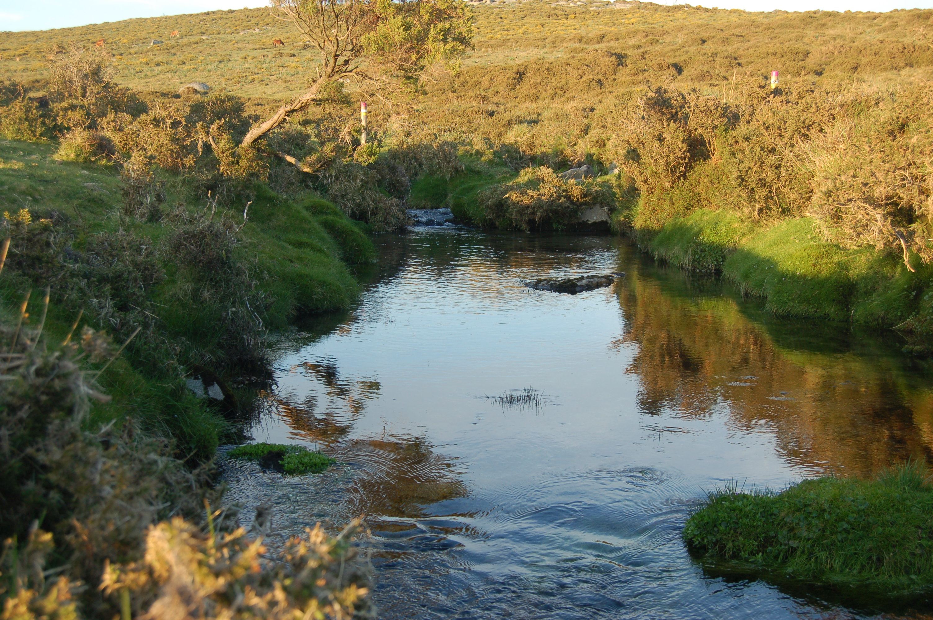 Río Barbanza, xunto á Arca da Barbanza